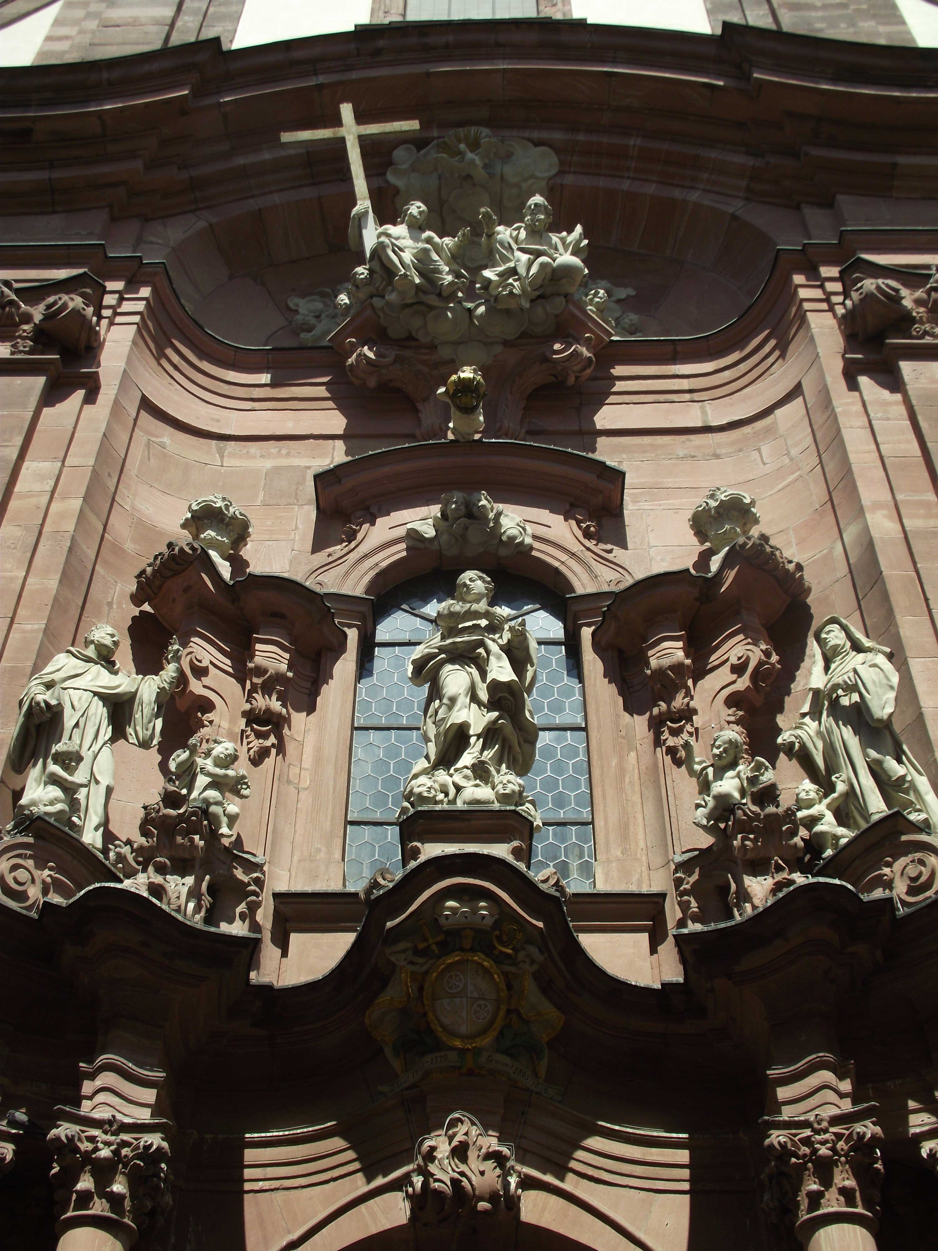 Mainz, Augustinerkirche, 1768-71